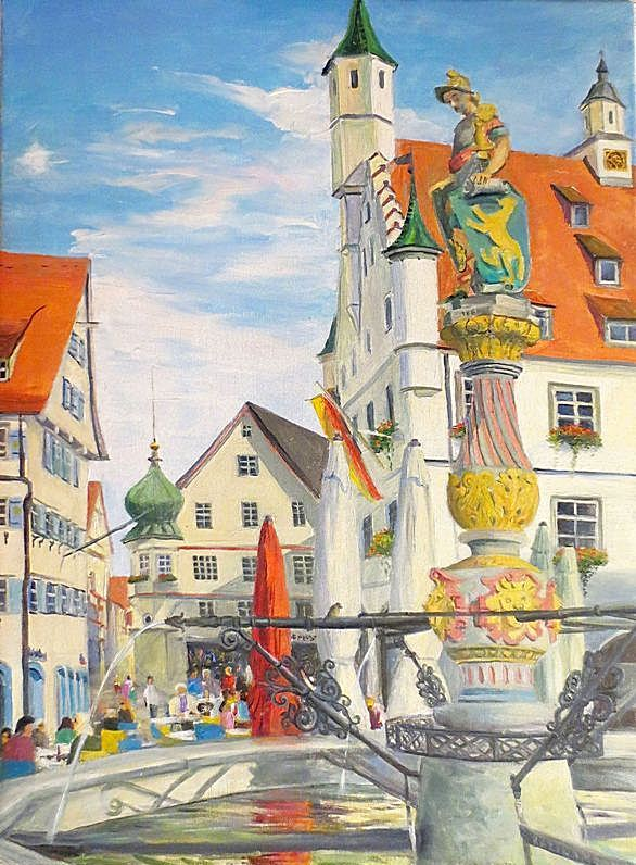 Биберах. Колодец